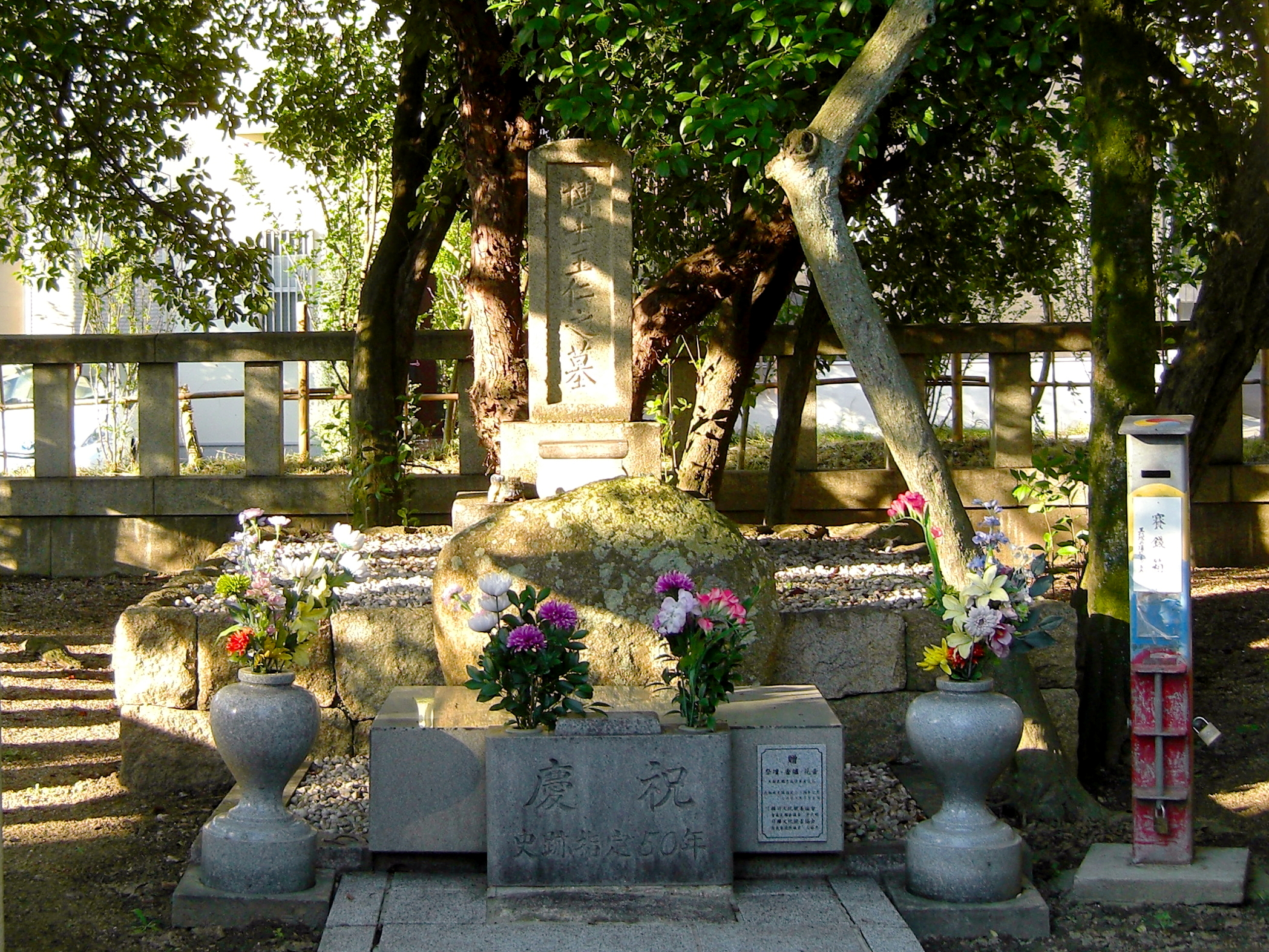 伝王仁墓(大阪府枚方市)